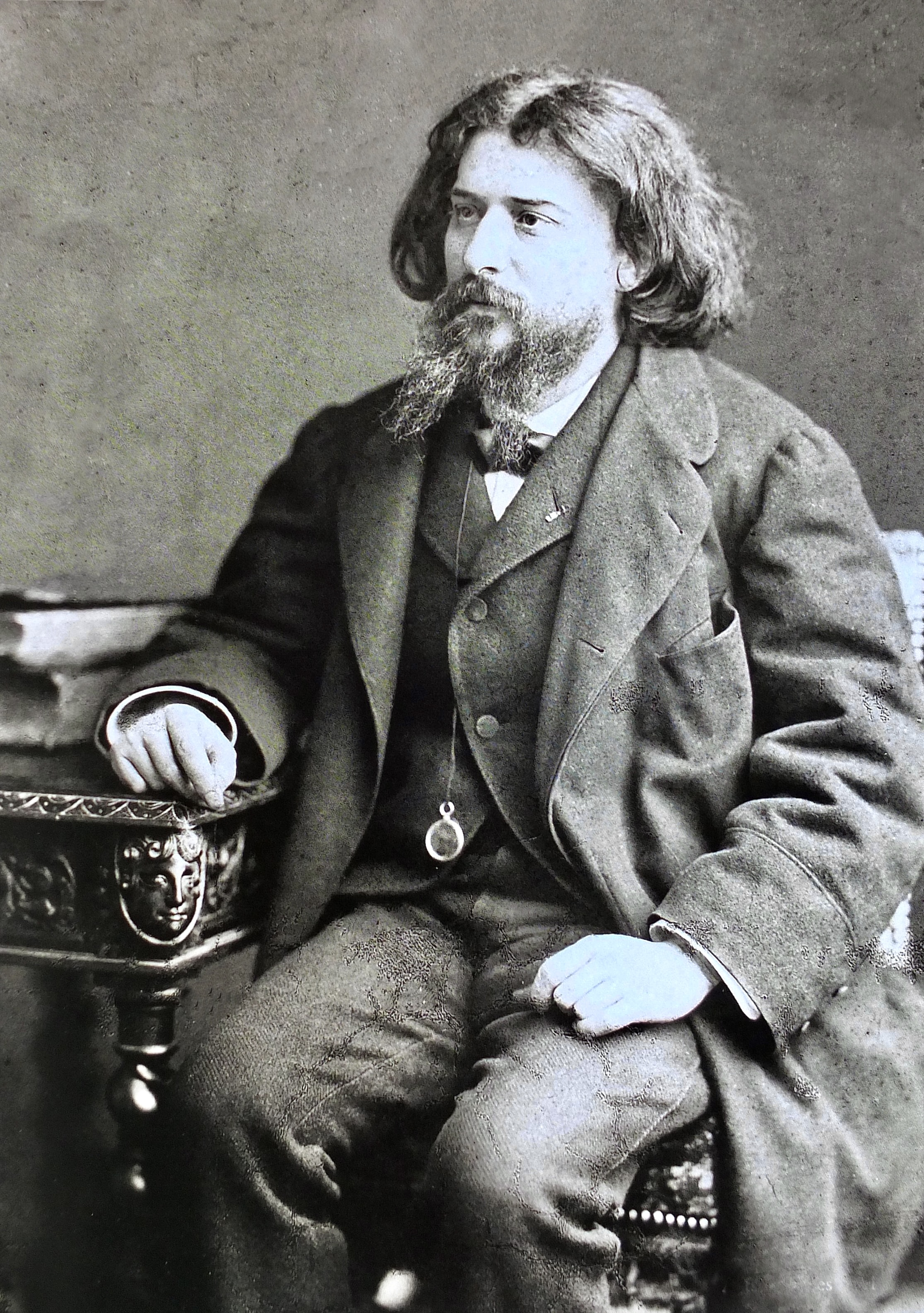 Alphonse Daudet, photographié par Paul Nadar en 1891.